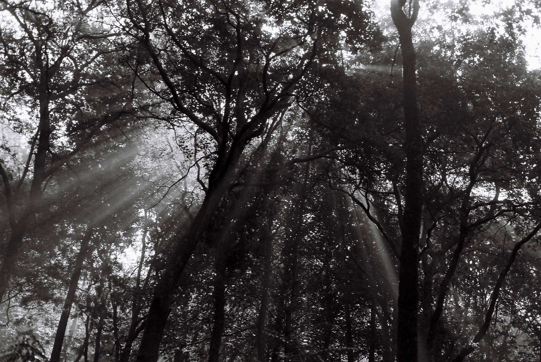 Serra da Penha, 2011